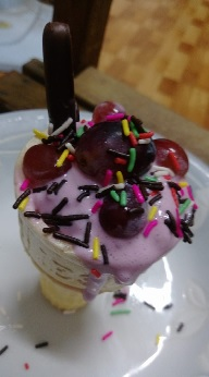 自製葡萄冰淇淋